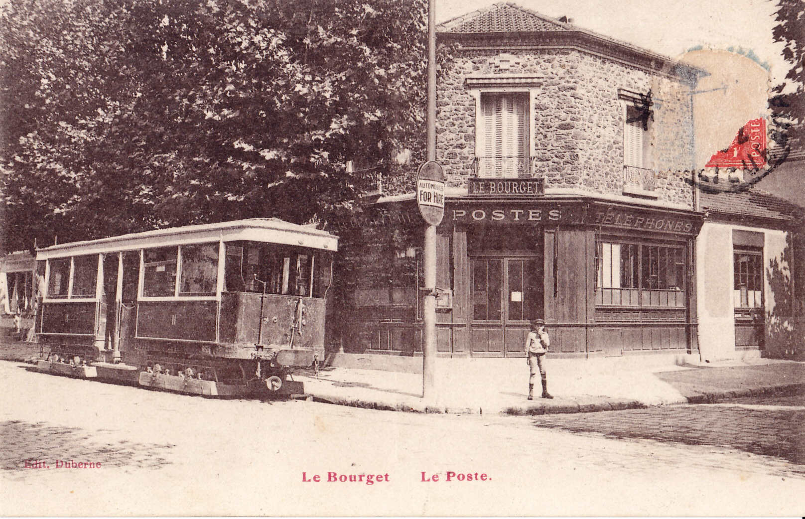 Carte postale ancienne éditée par Duberne :Le Bourget (Seine-Saint-Denis)|LE BOURGET - La Poste